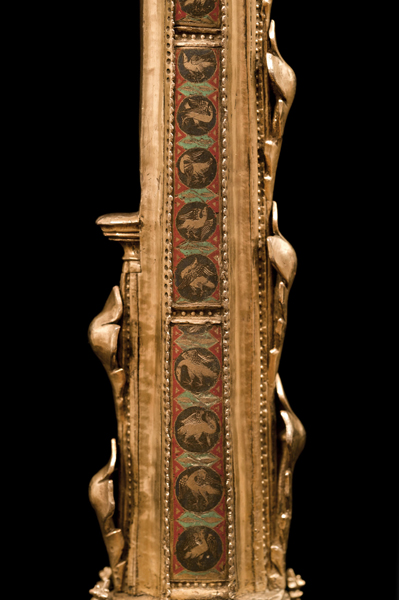 Báculo del Papa Luna (Baja Edad Media). Número de inventario: 52160.